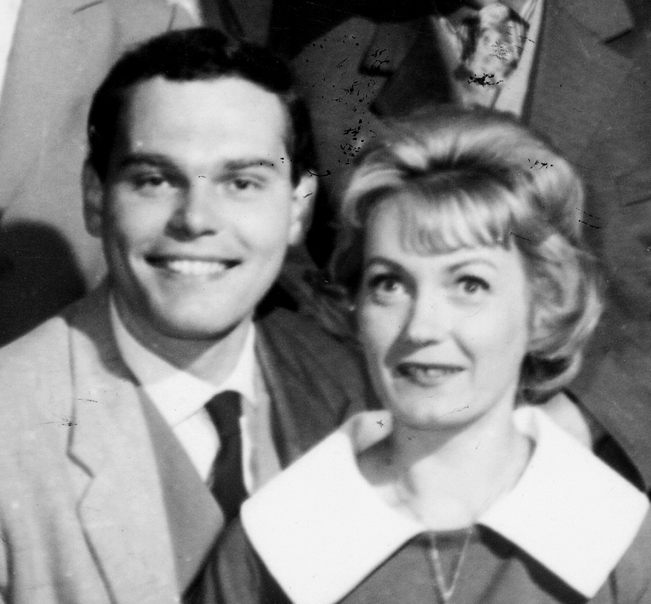 A Magyar Rádió A Szabó család című sorozatának főszereplői. Részlet: Lőte Attila és Vörösmarty Lili.